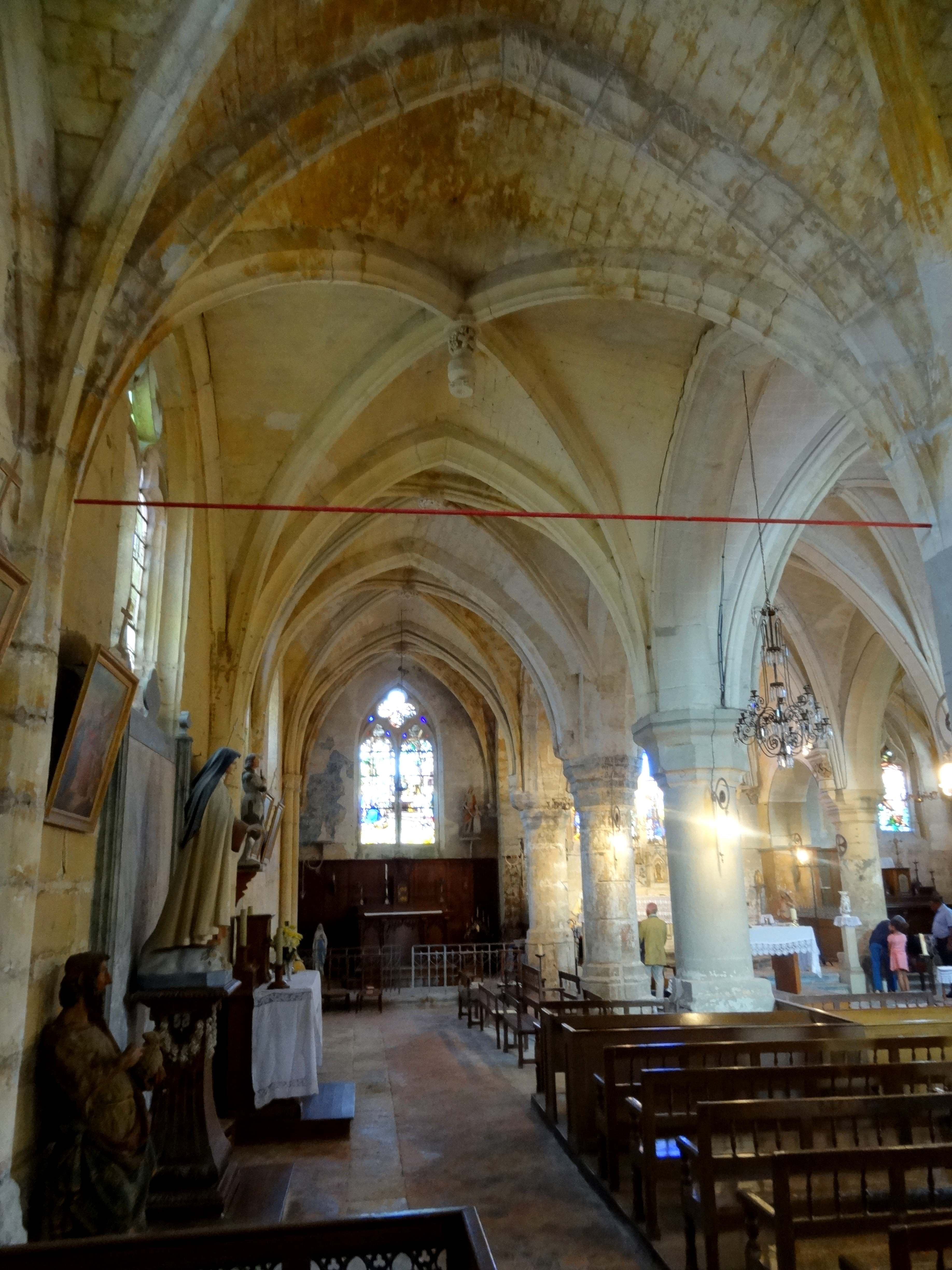 Intérieur de l'église - voir titre.